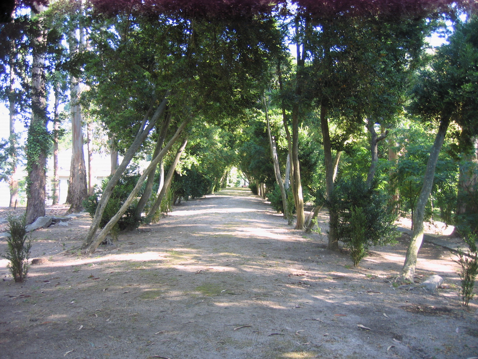 Jardinas da Ilha de São Simão (Galiza).